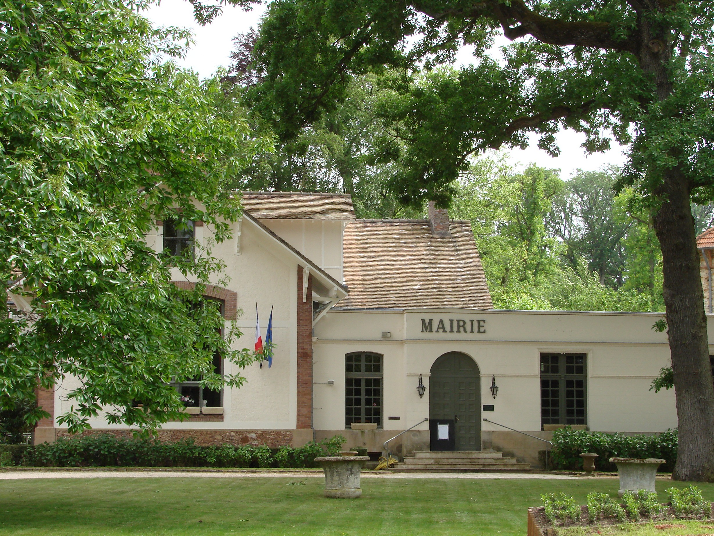 Barbizon, France, Guildhall